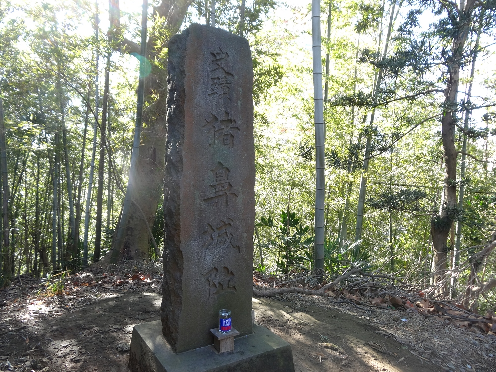 亥鼻城の石碑